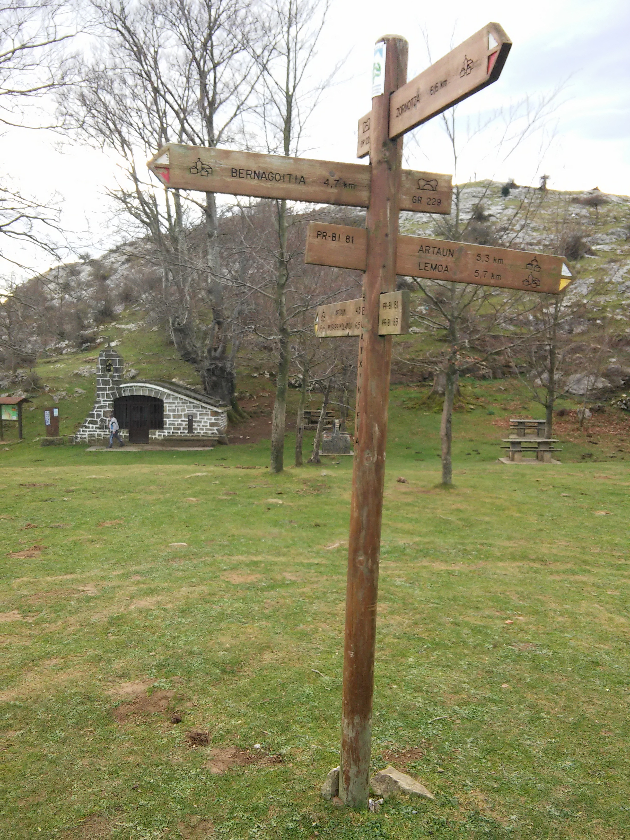 Belatxikietako San Ignazio baseliza